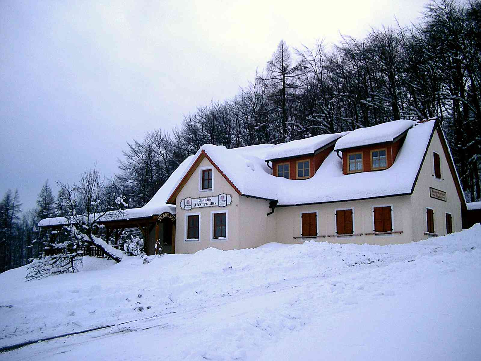 Es zeigt das Mesnerhaus auf dem Armesberg